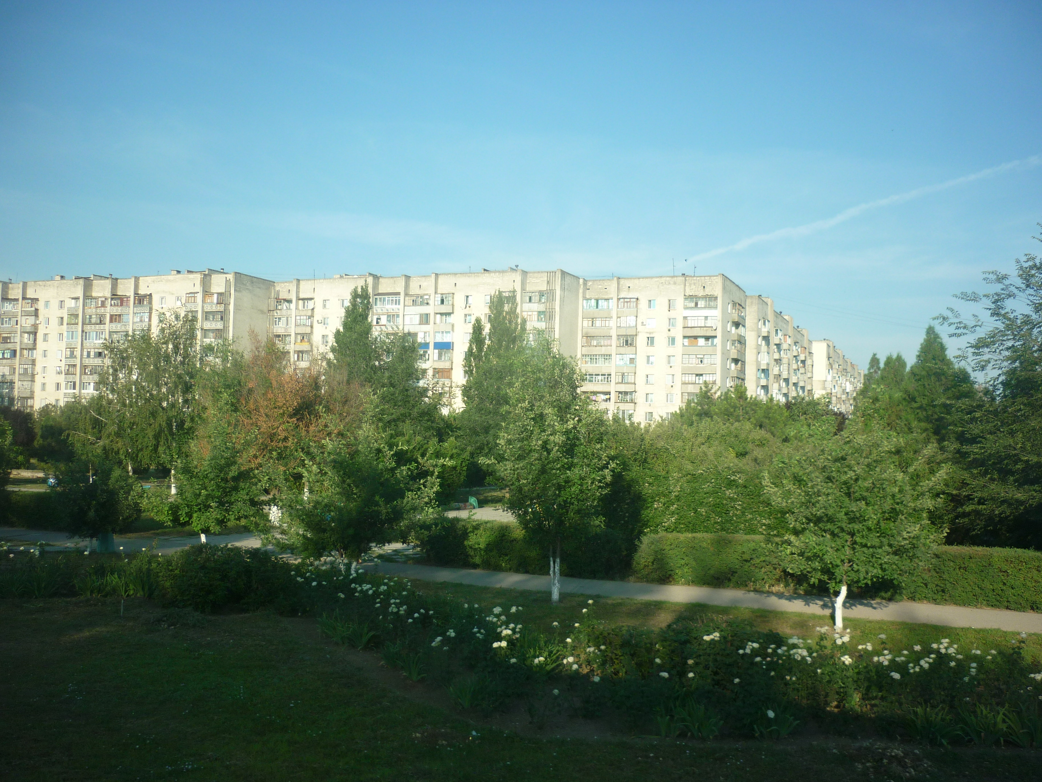 Квартали багатоповерхівок в місті Армянську в Криму